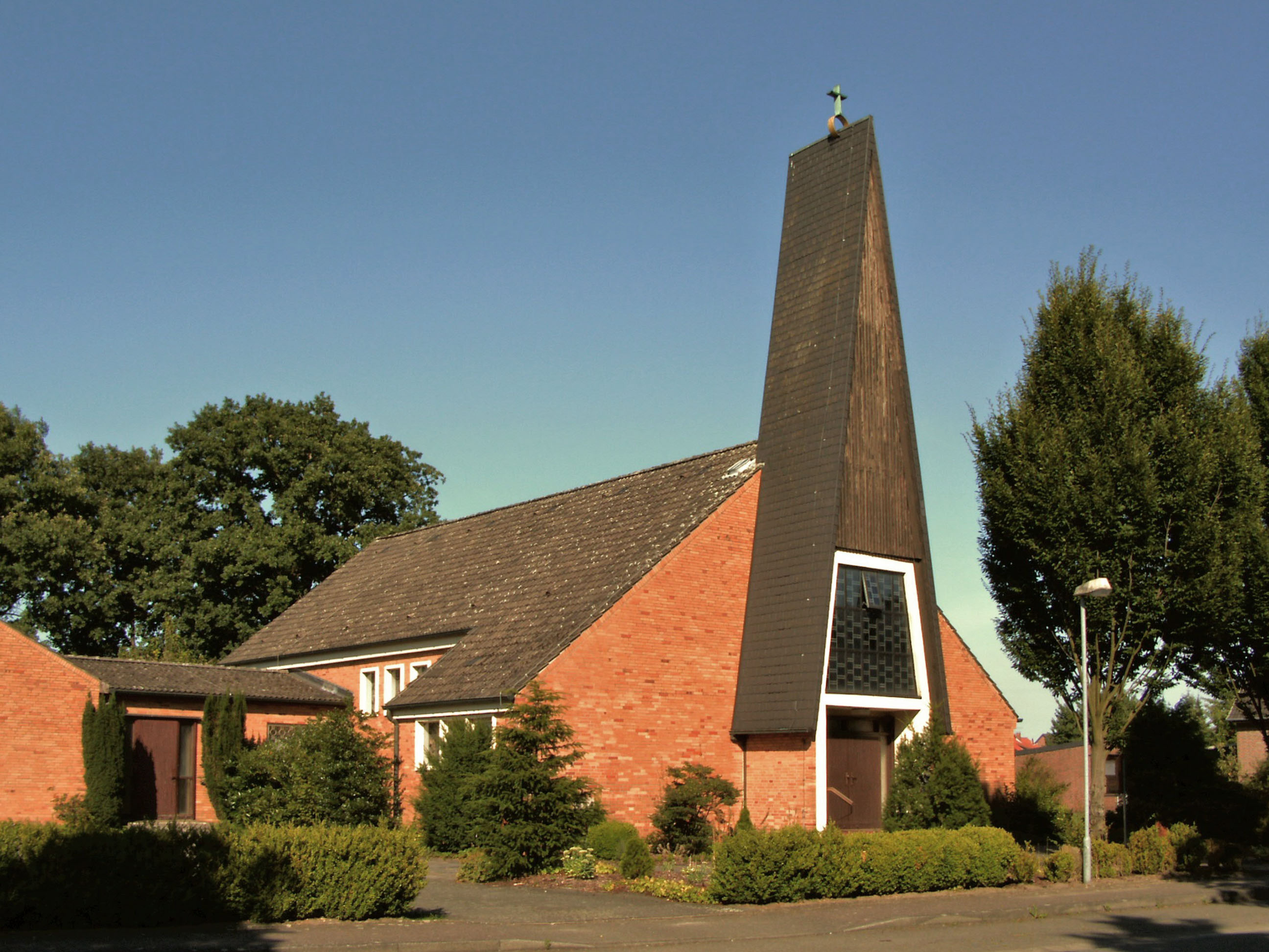 Parsau, katholische Kirche St. Raphael